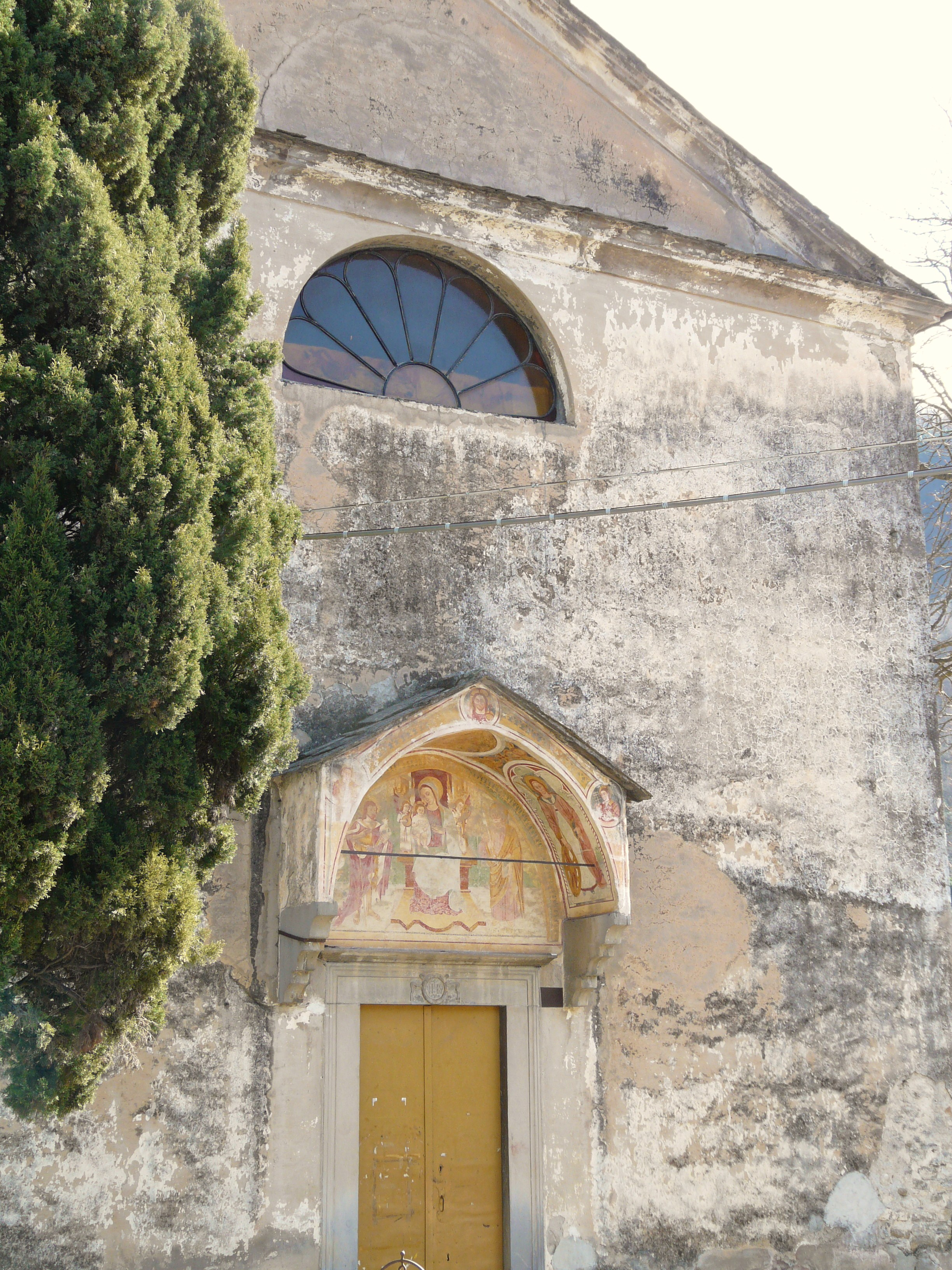 Chiesa di Nostra Signora Assunta, Bacelega, Ranzo, Liguria, Italia